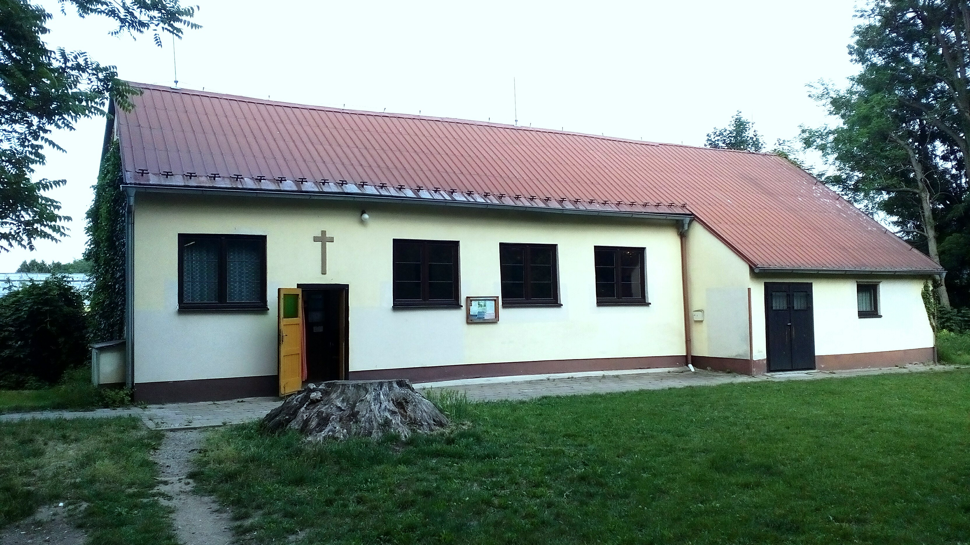 Kaple Pána Ježíše v Getsemanech (květen 2018)